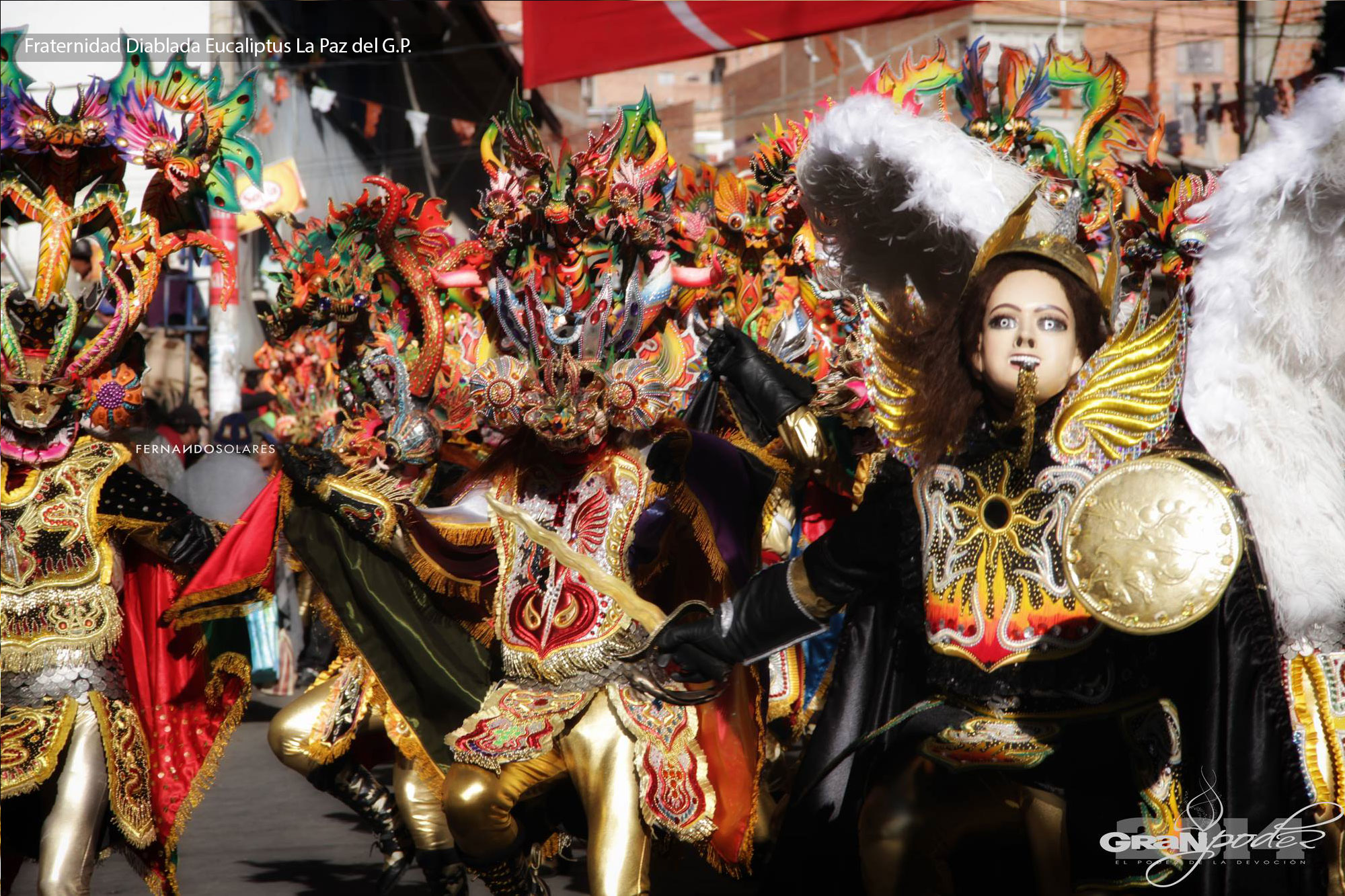 Fraternidad Diablada Eucaliptus La Paz del G.P., Angel y Buzos Dordos en la Fiesta del Gran Poder.